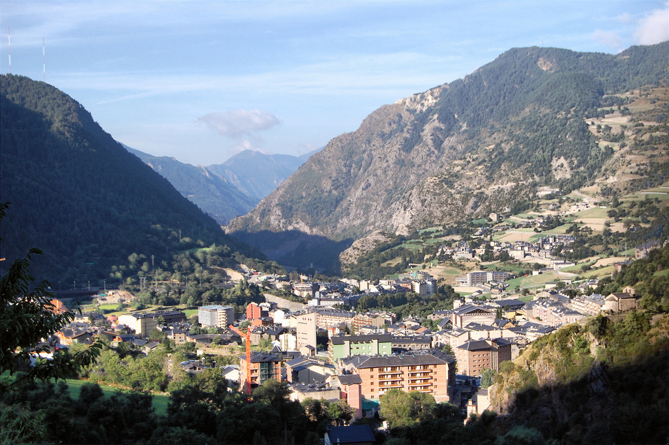 Encamp (Andorra)